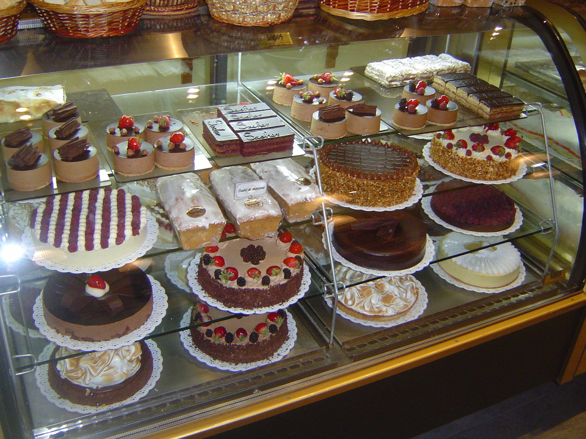 Tortas regionales